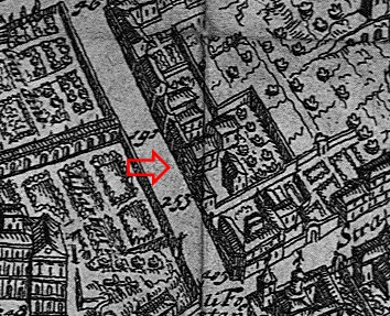 Pianta di Falda